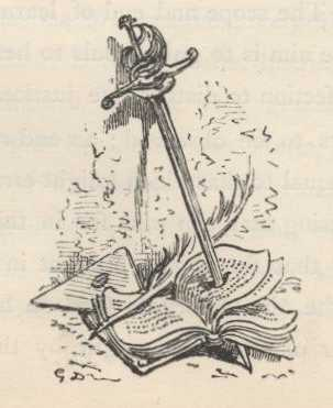 Gustave Doré, ilustração para "Dom Quixote" de Miguel de Cervantes